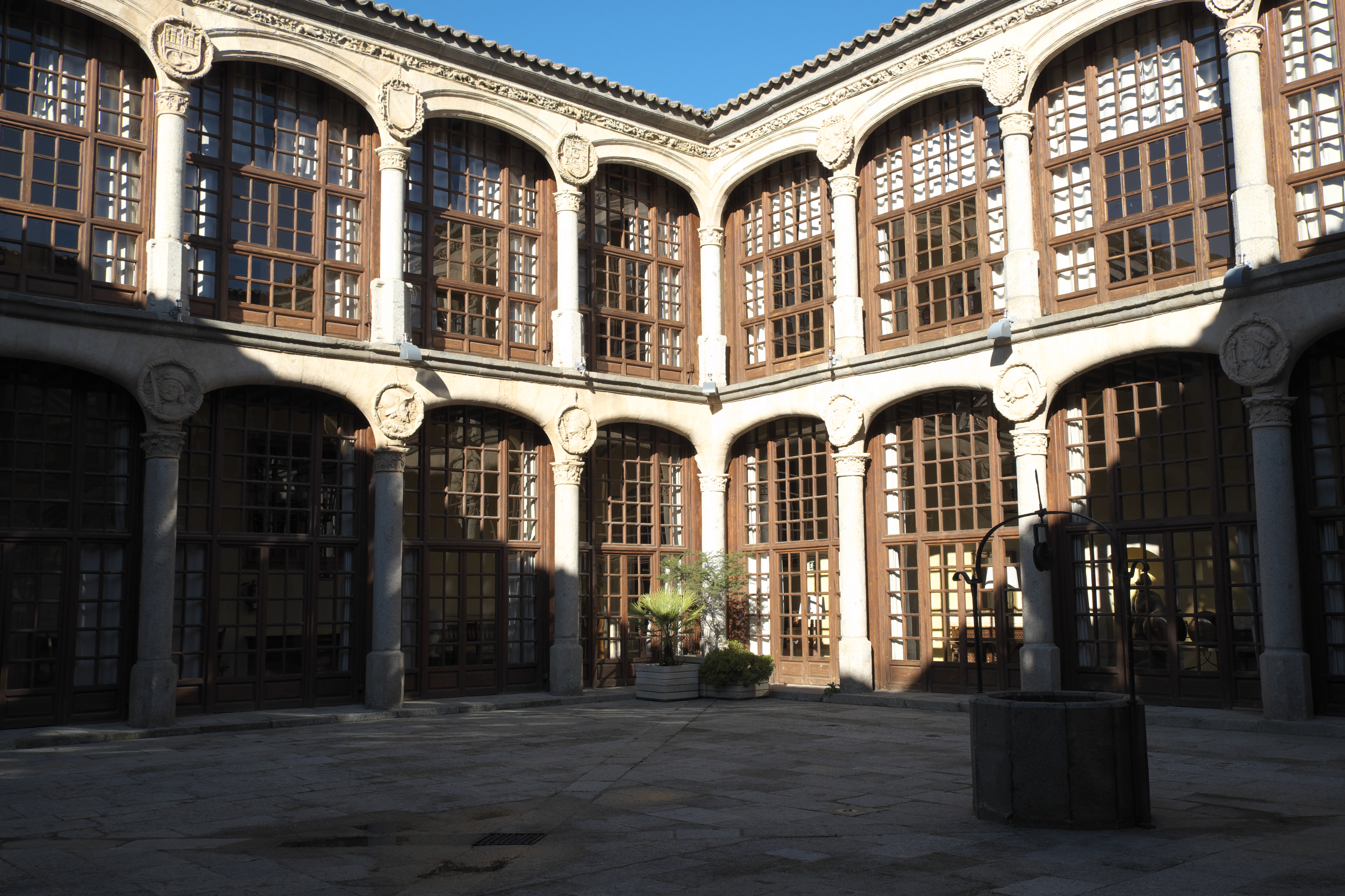 Innenhof im Palacio de los Condes de Alba y Aliste (heute Parador) in Zamora (Kastilien-León/Spanien)